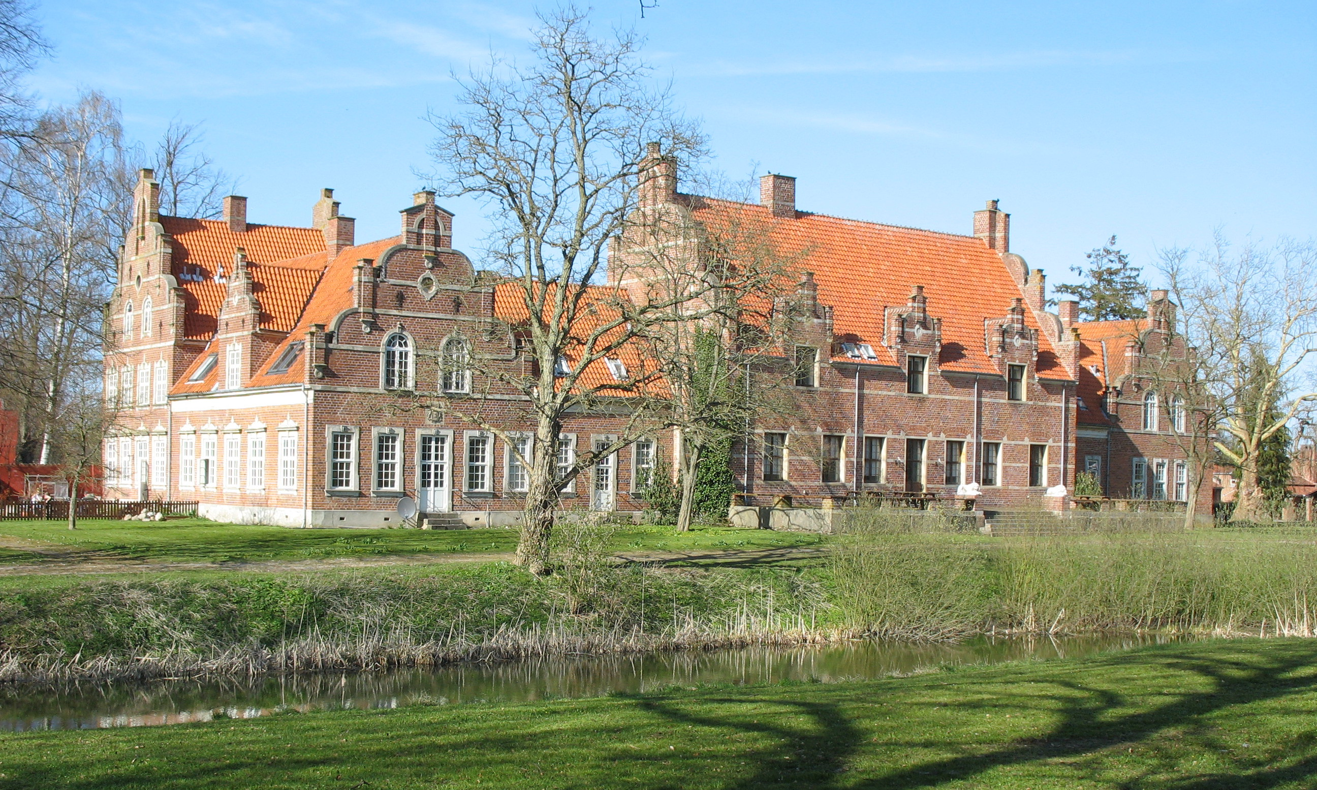 Tølløsegård Slot